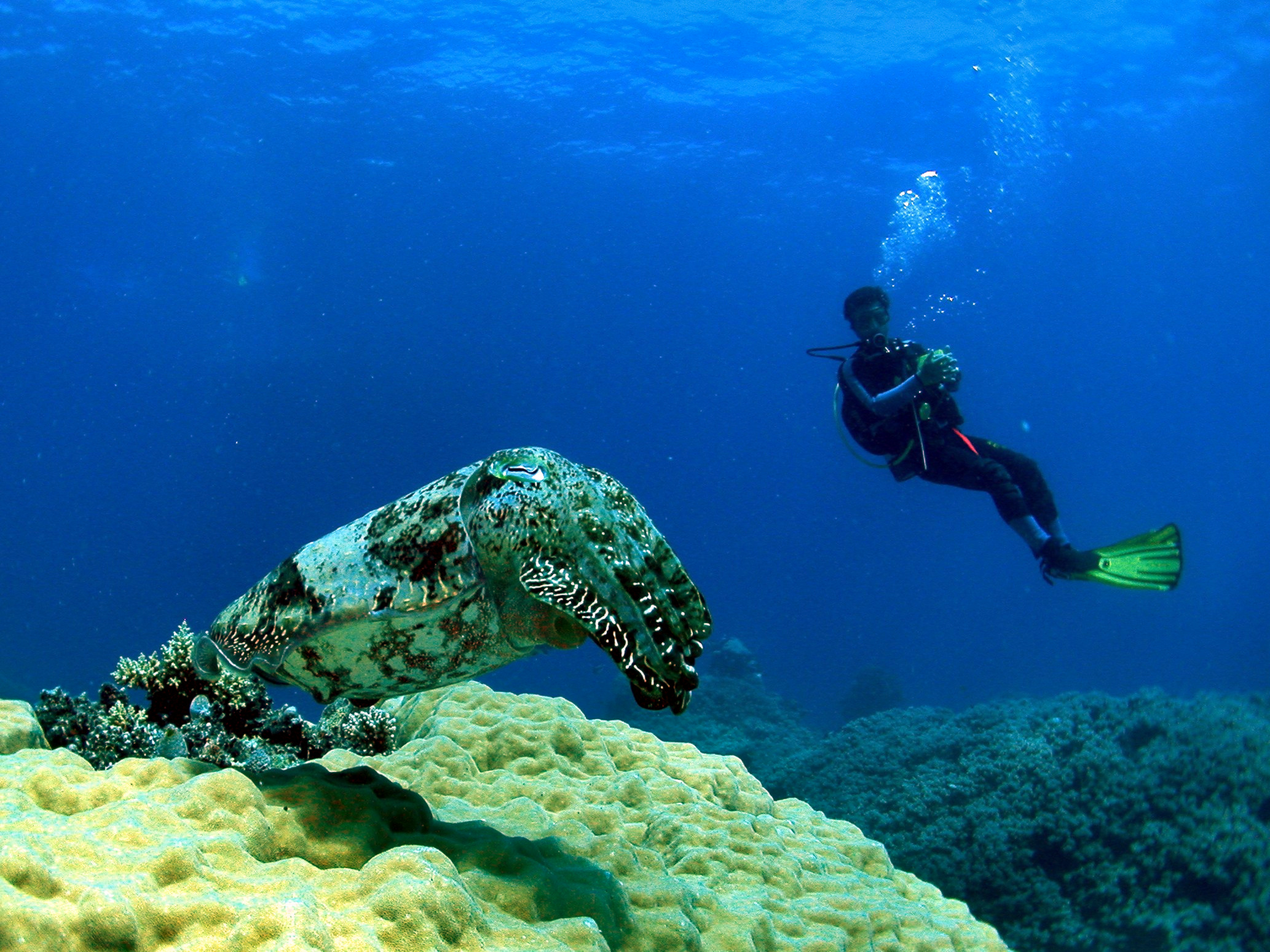 Sepia latimanus / Sepia esculenta どっちかわからん Great Barrier Reef, Australia